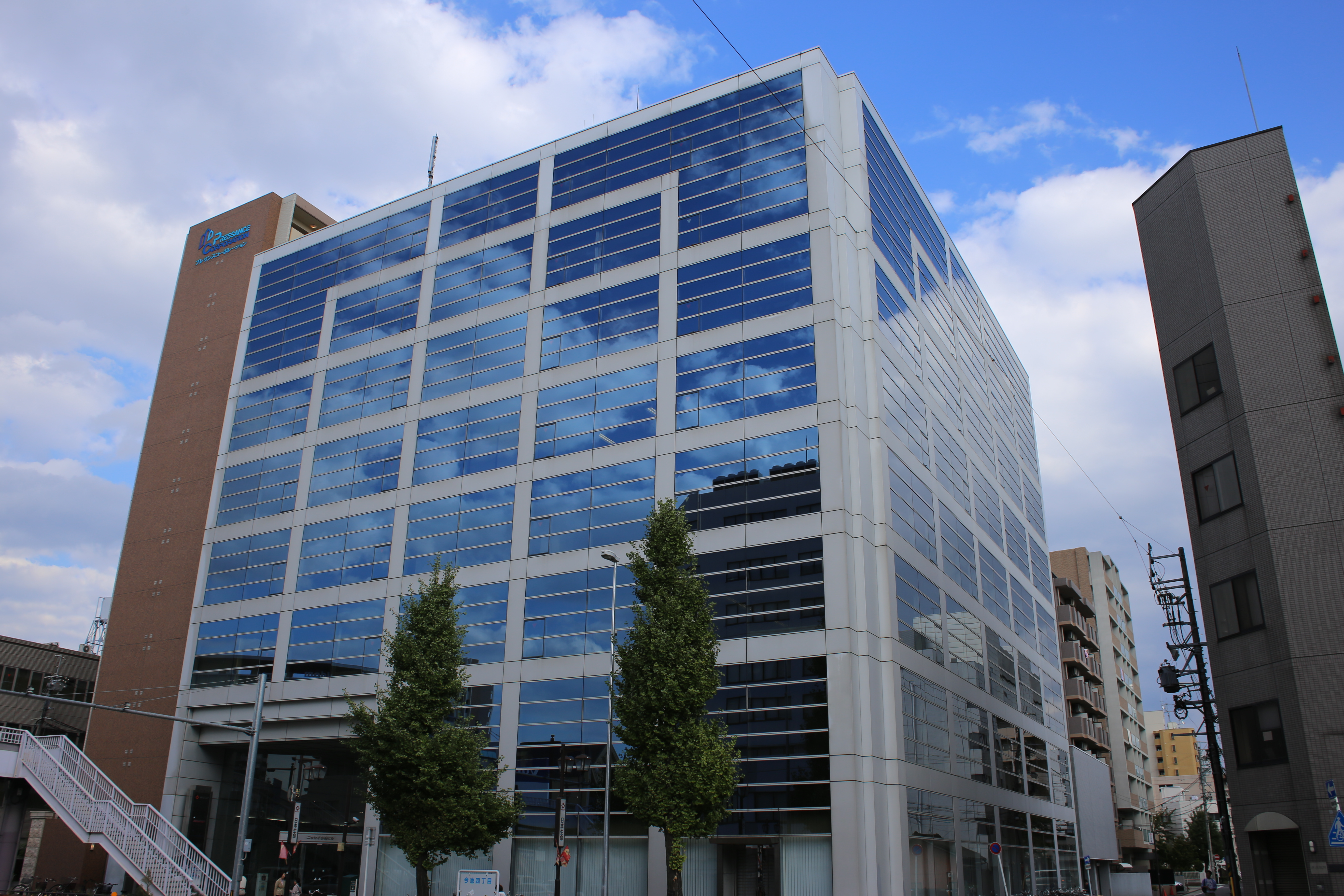 名古屋市千種区今池四丁目のニッセイ今池ビルを西側公道南側より撮影